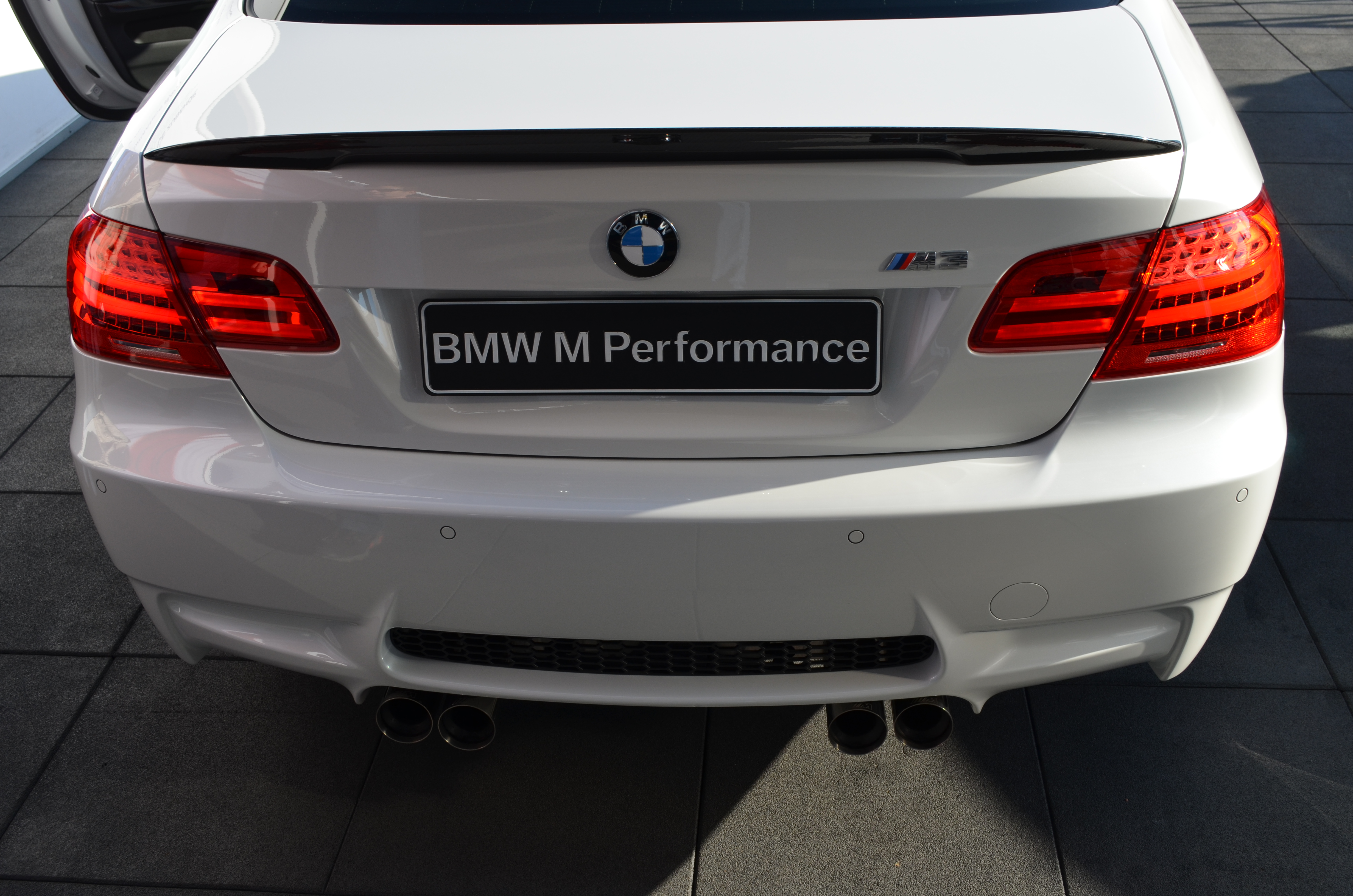 DTM 2013 Hockenheim